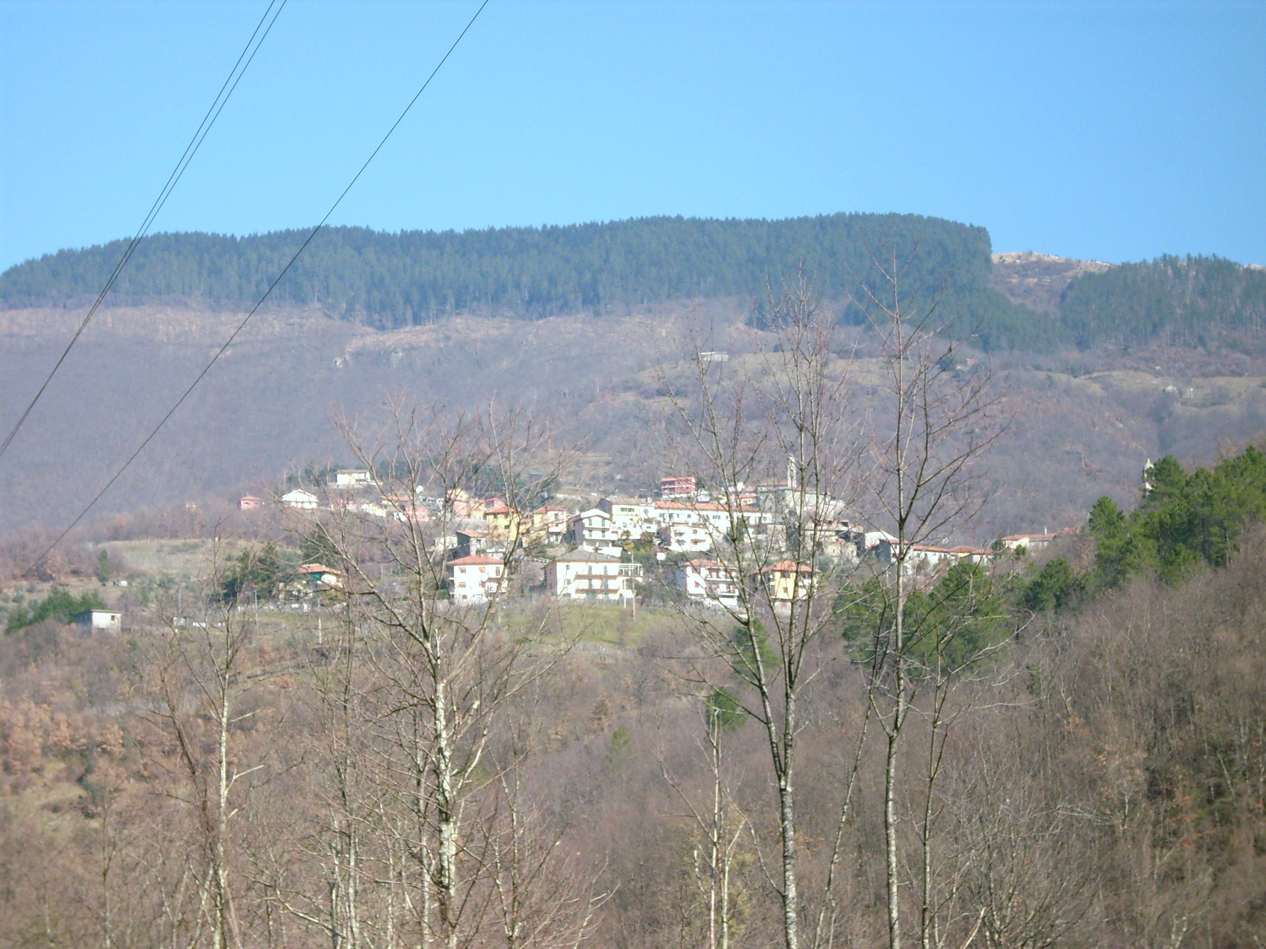 Panorama di Antessio, Sesta Godano, Liguria, Italy